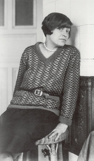 Elfriede Lohse-Wächtler: Portrait-Aufnahme vor dem Kachelofen (um 1928)